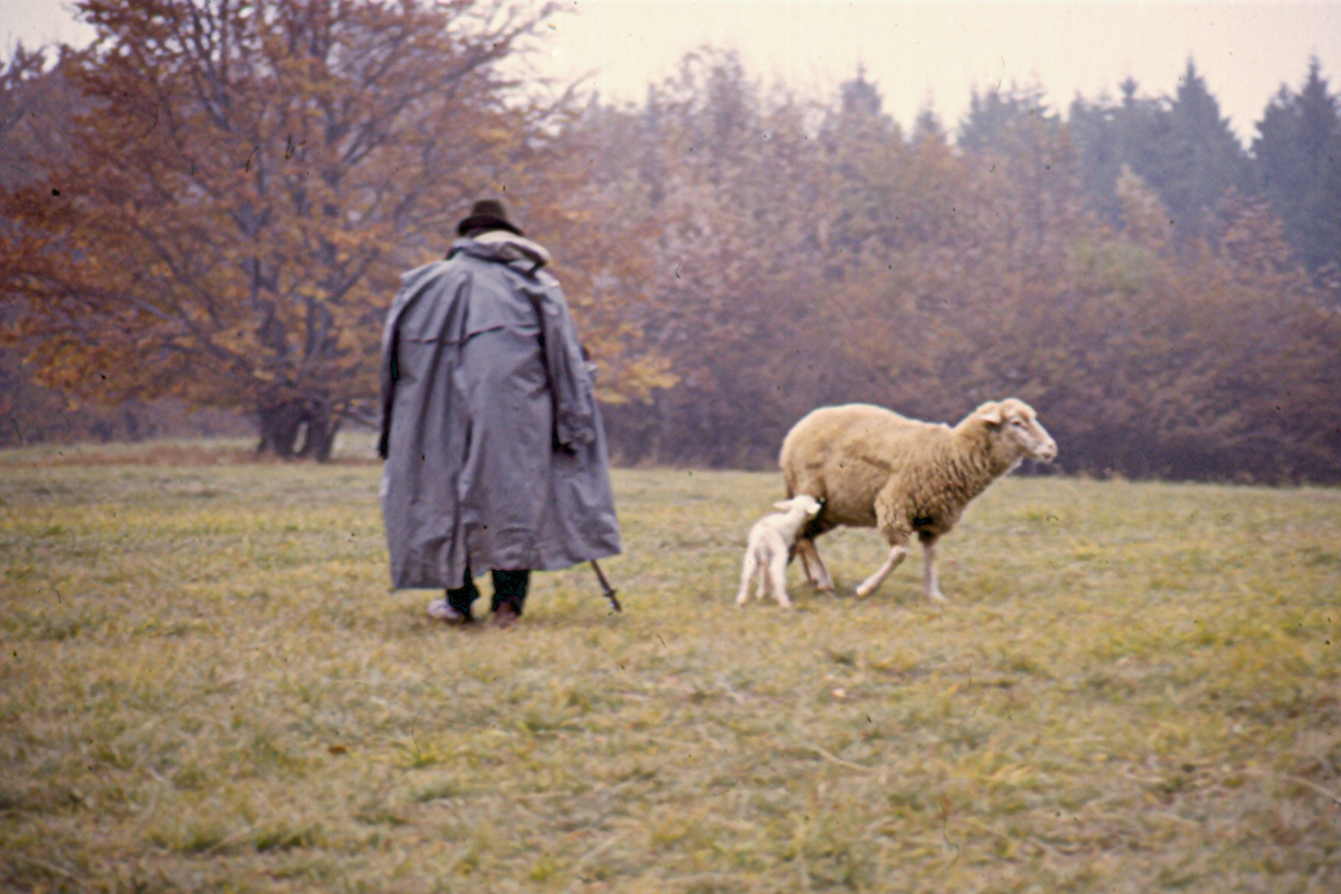 Schäfer auf der Schwäbischen Alb in den 1980er-Jahren